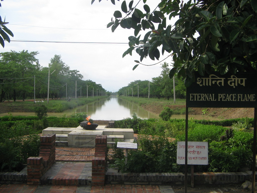 Eternal peace flame Lumbini